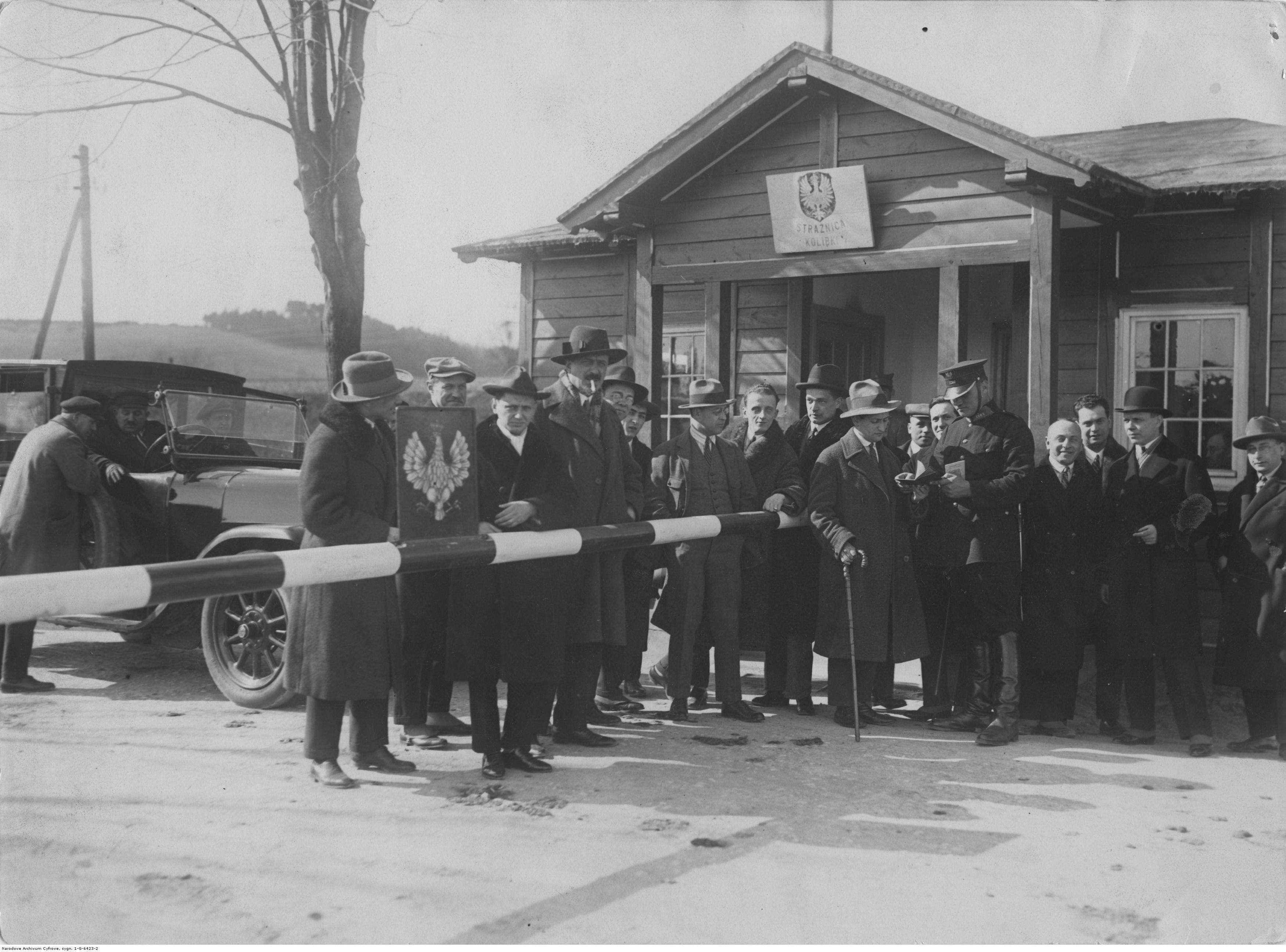 Posterunek Straży Granicznej w Kolibkach (granica Polski i Wolnego Miasta Gdańska). Koncern Ilustrowany Kurier Codzienny - Archiwum Ilustracji. Sygnatura: 1-G-6423-2